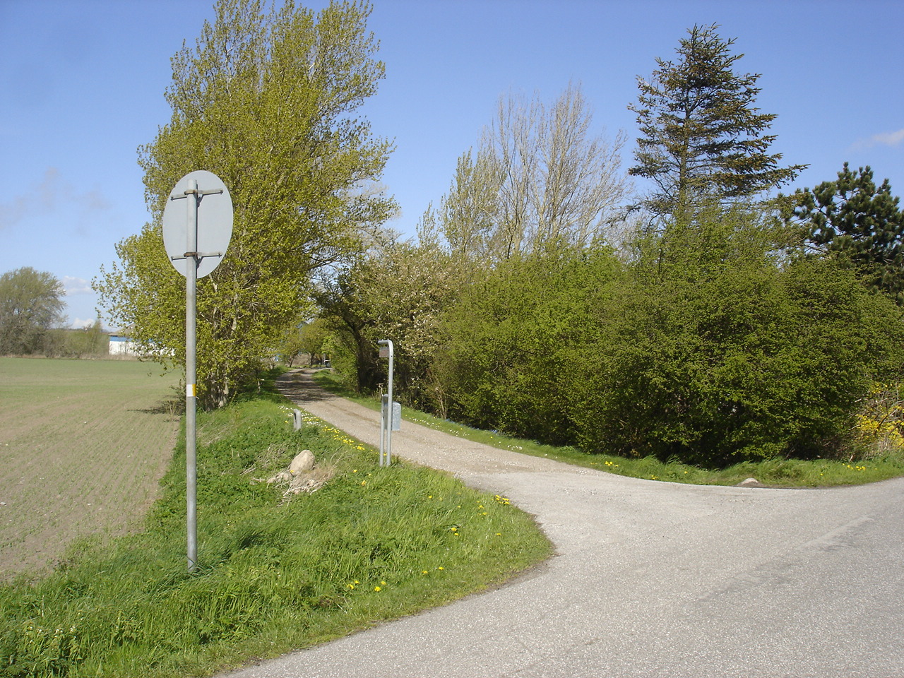 Indkørsel mod nord til Viaduktvej 8 på banedæmning fra den første Masnedøbane